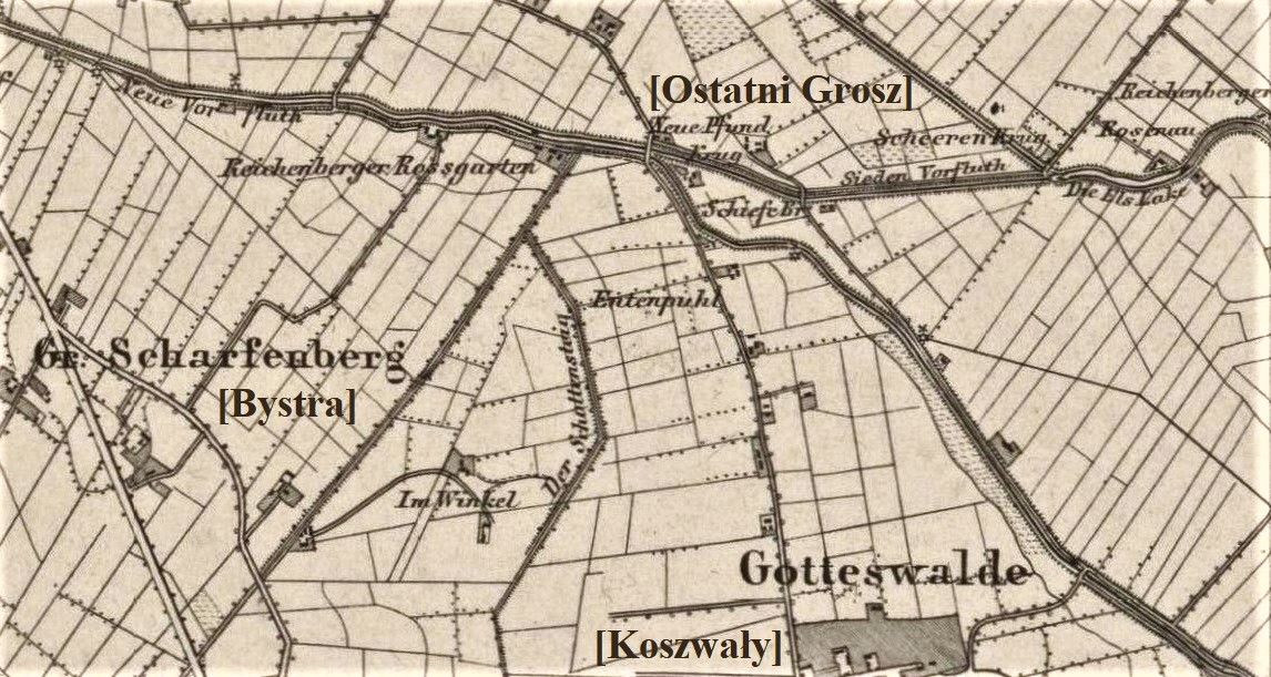 Ostatni Grosz na mapie Karte der Umgegend von Danzig, 1901